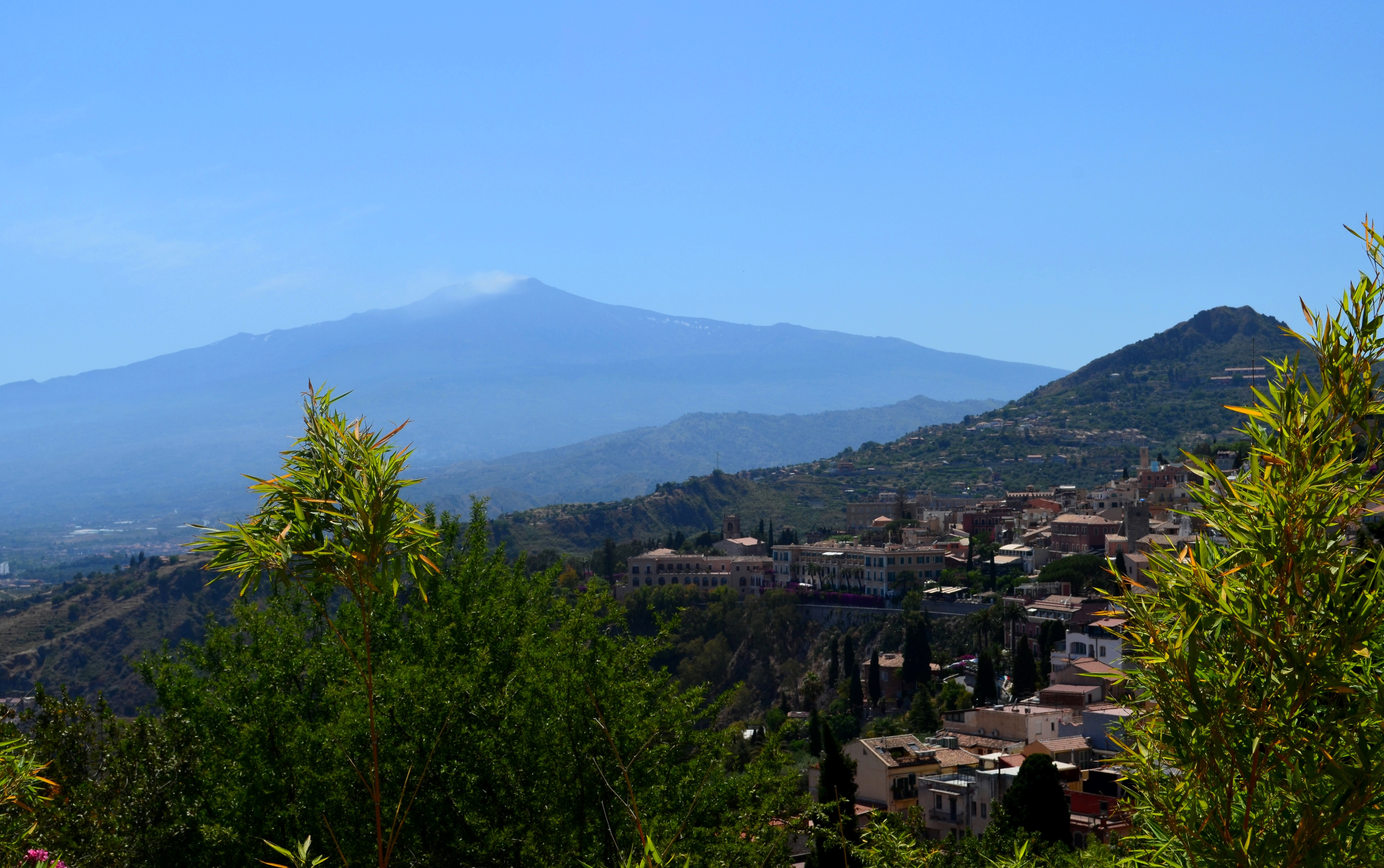 Vaizdas į Etnos ugnikalnį iš Taorminos, Sicilija